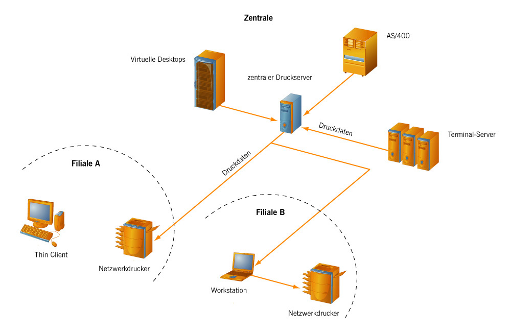 Drucken im Netzwerk